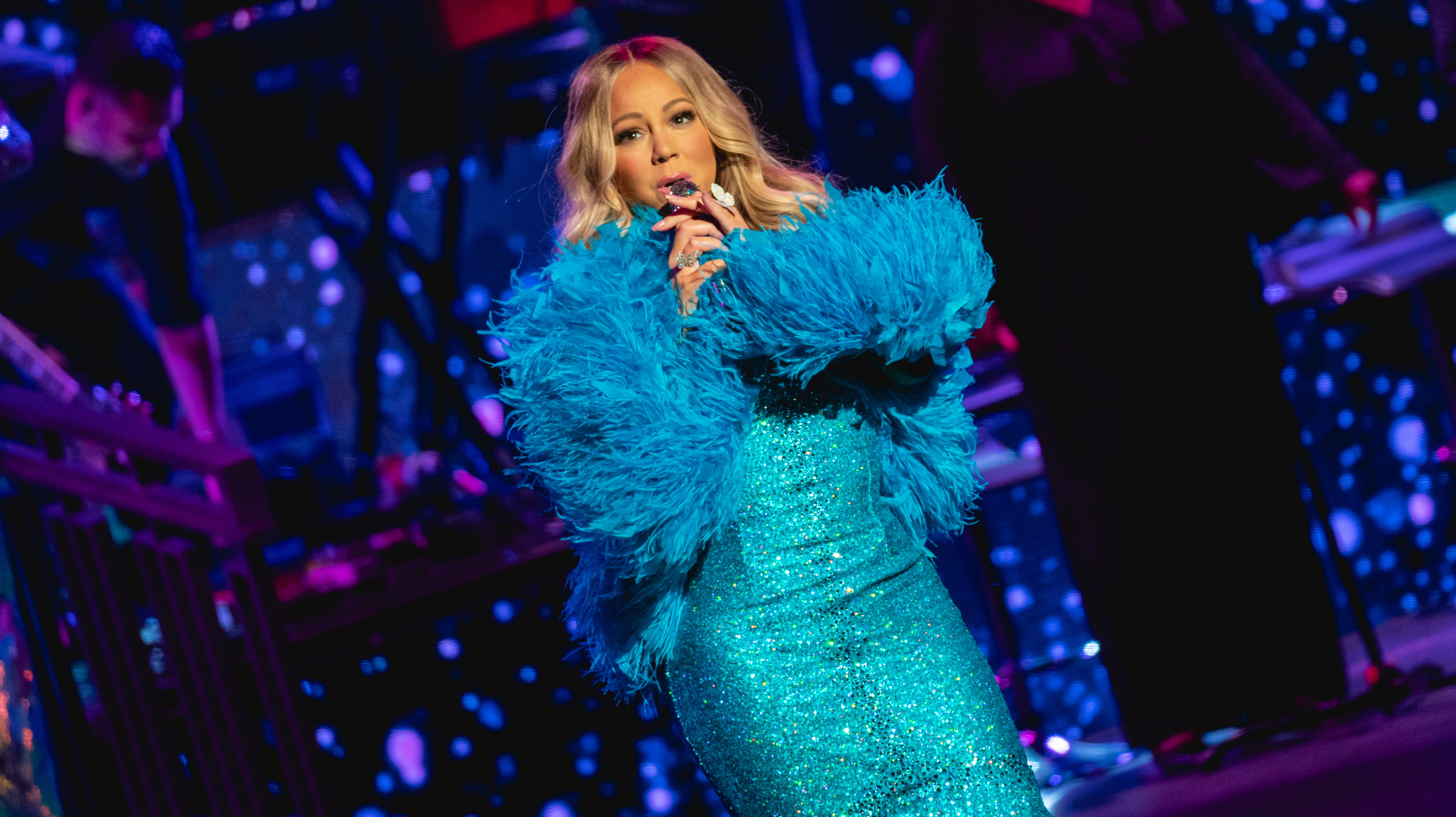 MariahRAH270519-60